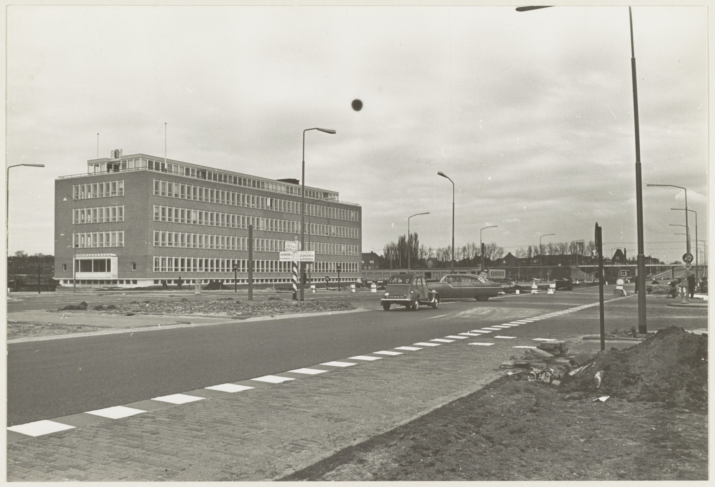 CollectieCollectie Fotoburo de BoerInventarisnummerNL-HlmNHA_54010569BeschrijvingKruising Westelijke Randweg-Zijlweg. Links de HTS aan de Veldzigtlaan.FotonummerNL-HlmNHA_1478_4990DocumenttypeTopografische prenten, tekeningen en foto'sVervaardigerBoer, Cees de (1918-1985) Soort vervaardigerFotograaf LandNederland ProvincieNoord-Holland GemeenteHaarlem PlaatsHaarlem StraatWestelijke Randweg GeografischZijlweg-West Begindatum1963Einddatum1963TechniekFoto Trefwoordenverkeer, hoger onderwijs